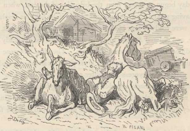 "Sancho Pança a dormir entre Rocinante e o jumento" (1863), iIustração por Gustave Doré para “Don Quixote“ de Miguel de Cervantes.